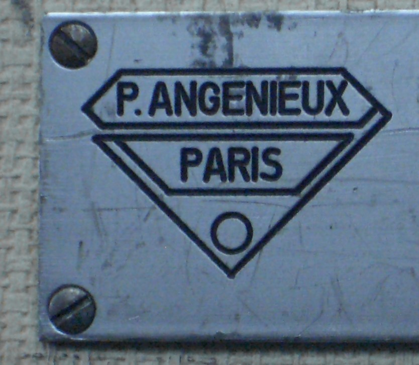 Angenieuxlogo Old